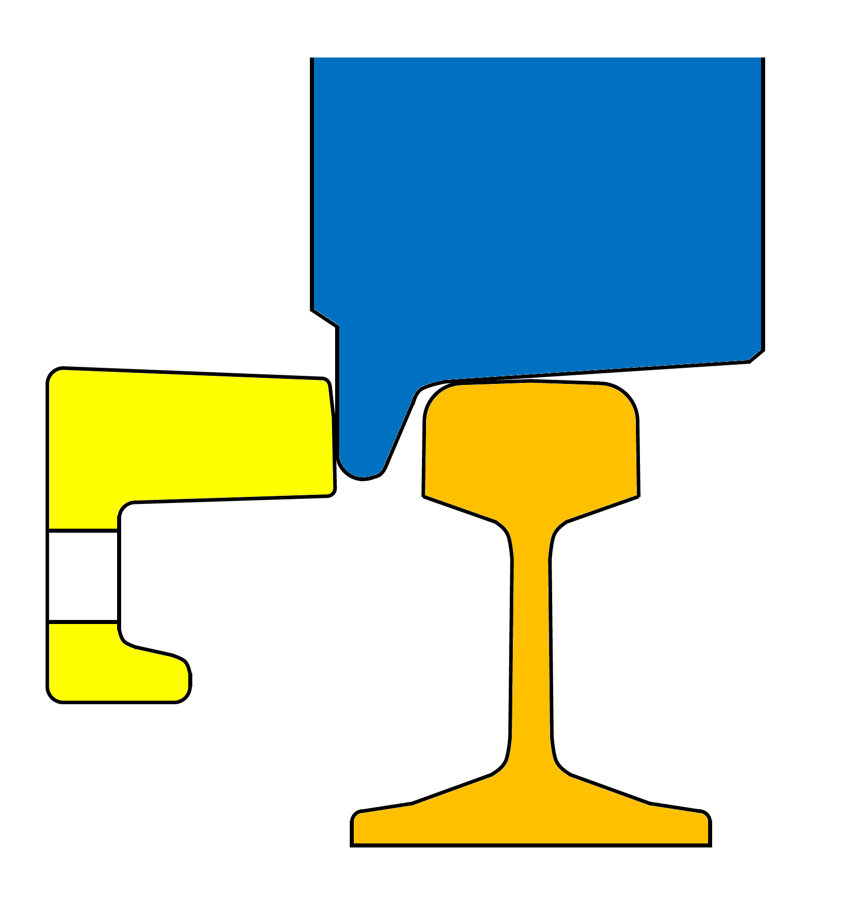 Die Radlenker­ (gelb) der TB-Strecke der Appenzeller Bahnen (AB) weisen keine Überhöhung gegenüber der Schienenoberkante auf.Die Tango-Züge der AB sind wegen den unterschiedlichen Radlenker­überhöhungen – bei der SGA-Strecke betragen sie 30, bei der TB 0 Millimeter – mit Radreifenprofilen (blau) wie beim Karlsruher Modell ausgestattet.